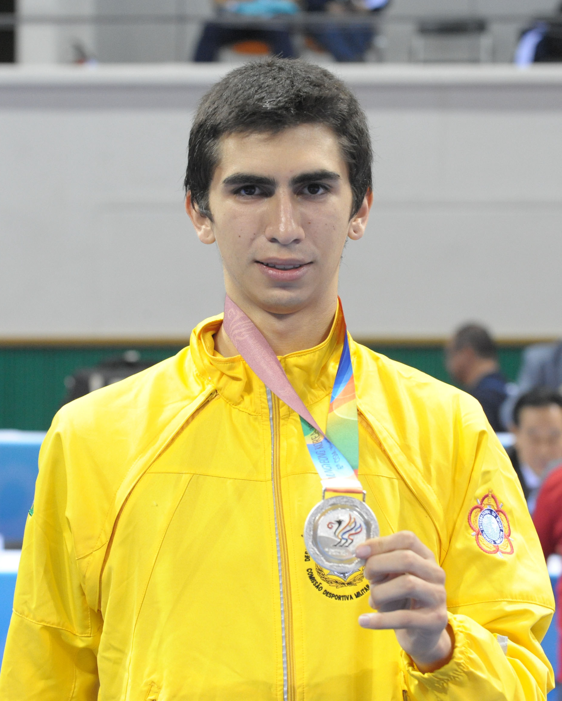 Guilherme recebe medalha no taekwondo. Foto: Felipe Barra